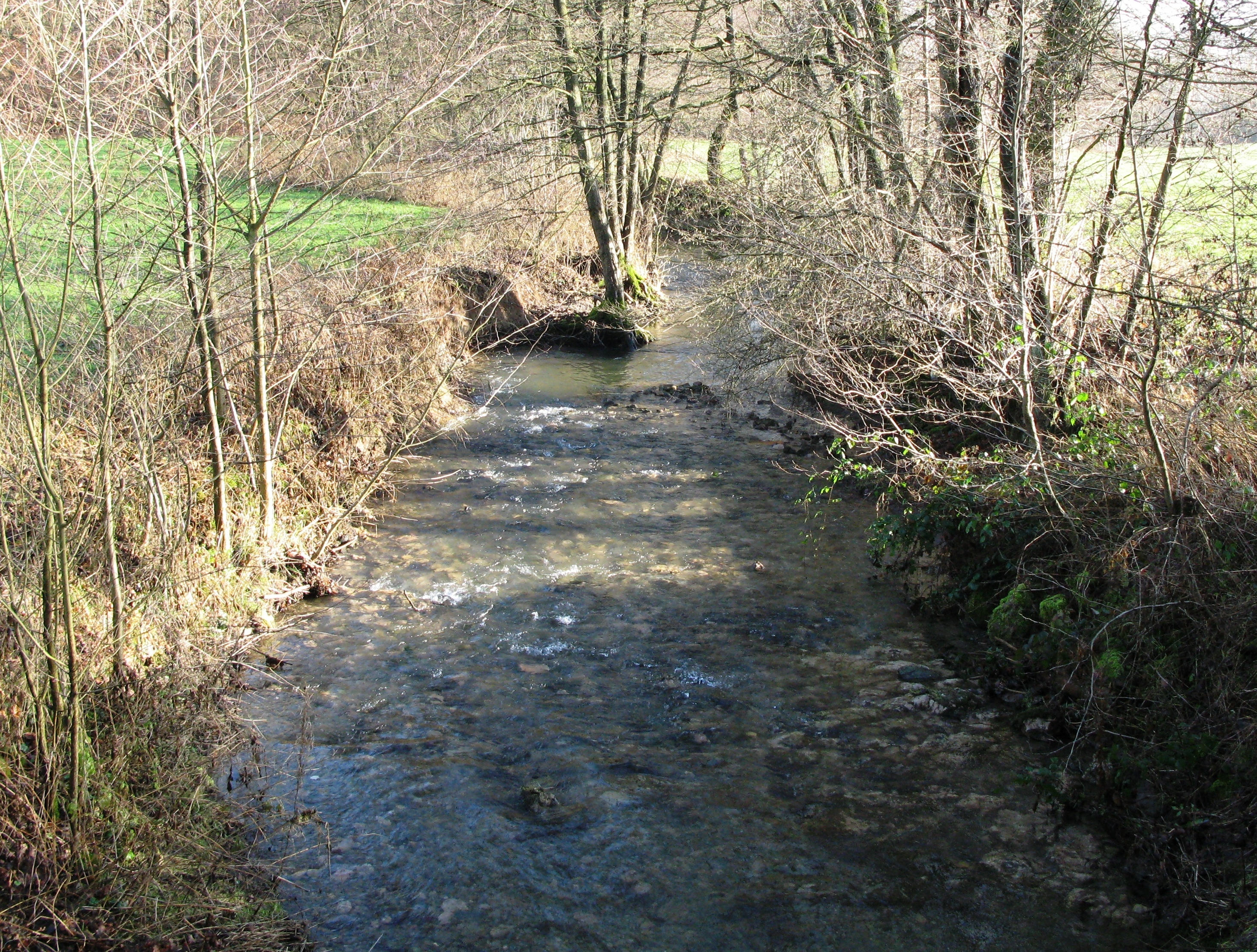 D'Noutemerbaach an Directioun Grendel gekuckt (Belsch).